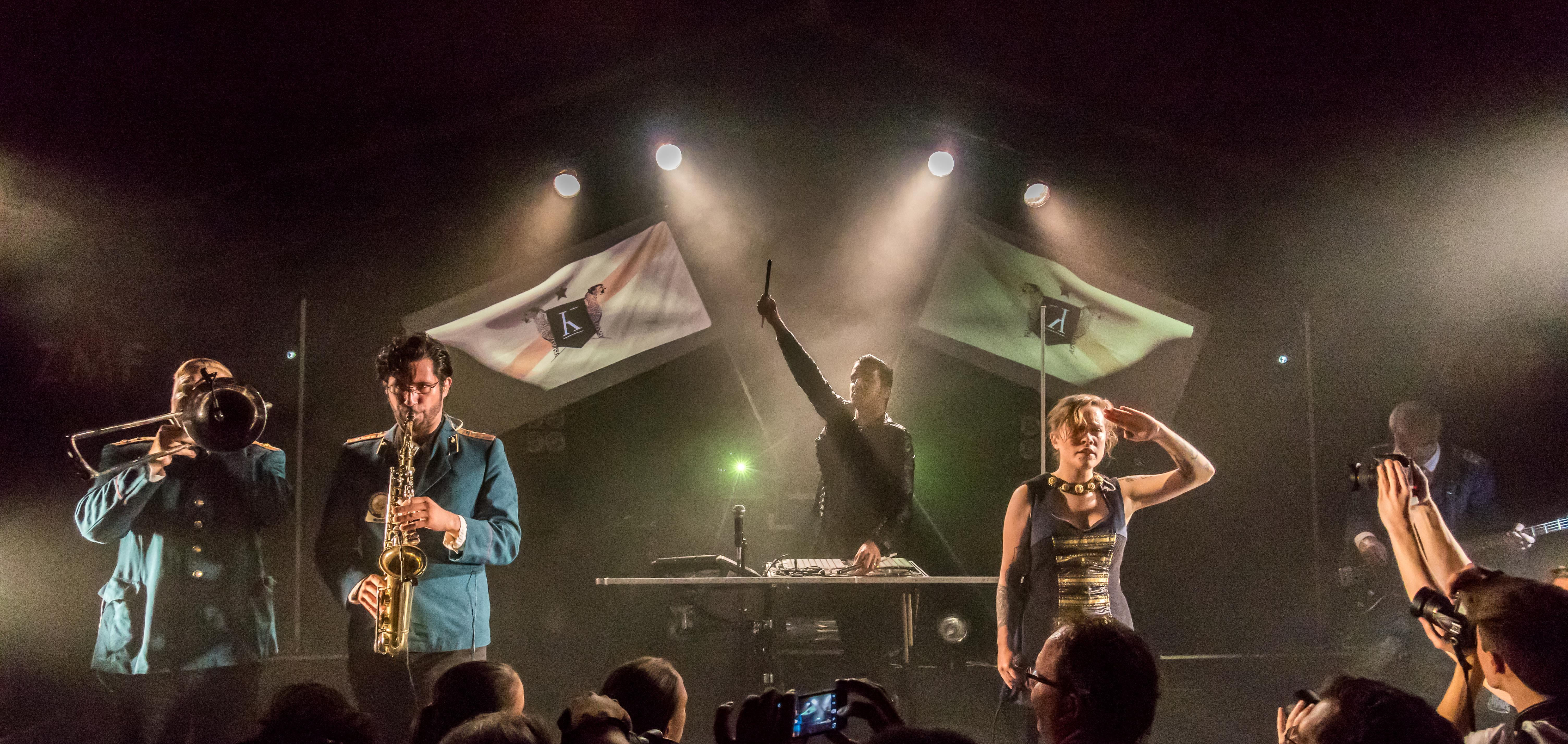 Das Zelt Musik Festival 2014 in Freiburg im Breisgau (16.07.2014 - 03. 08.2014) 25.07.2014 Kadebostany